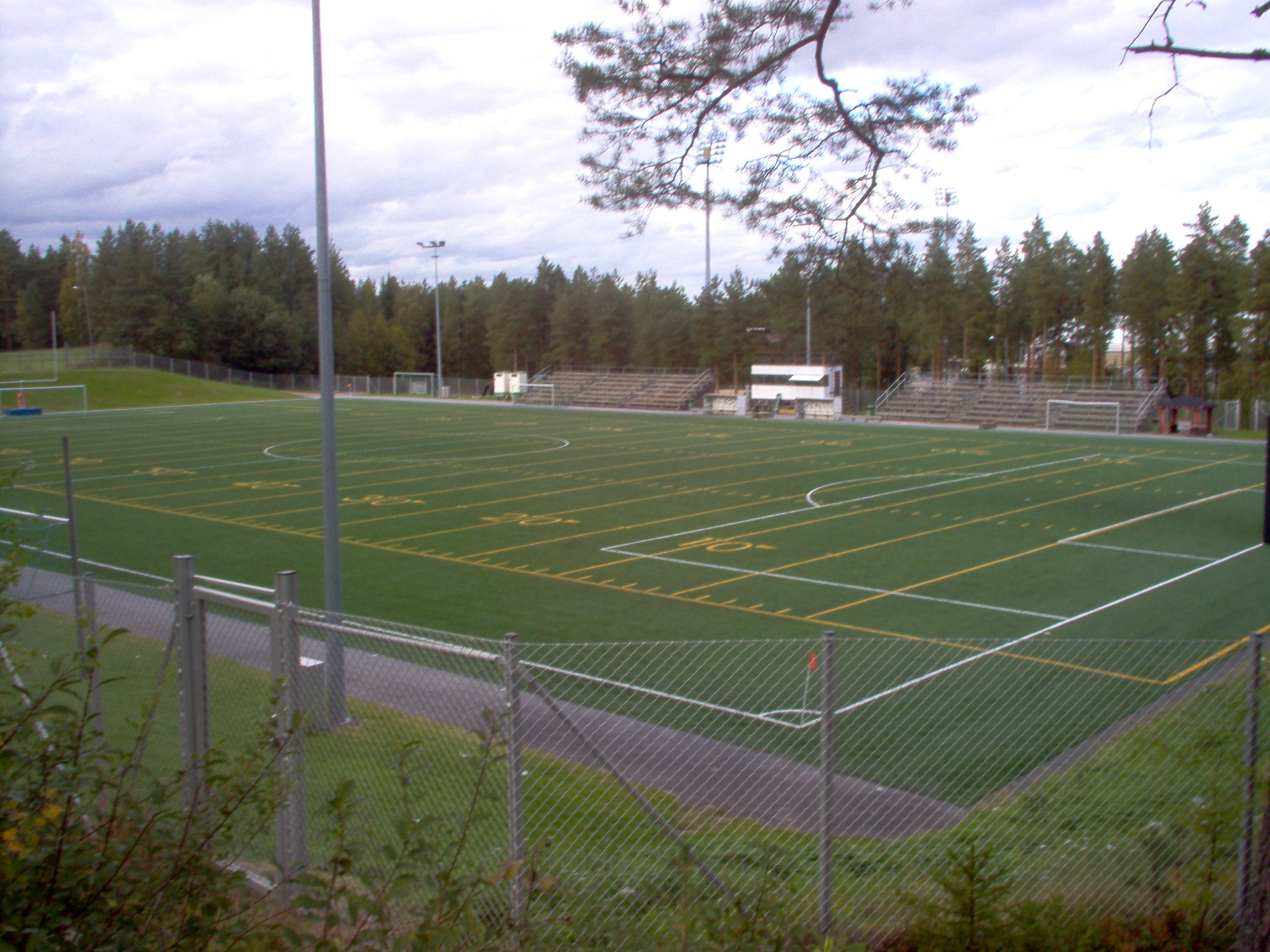 Seinäjoen tekonurmi